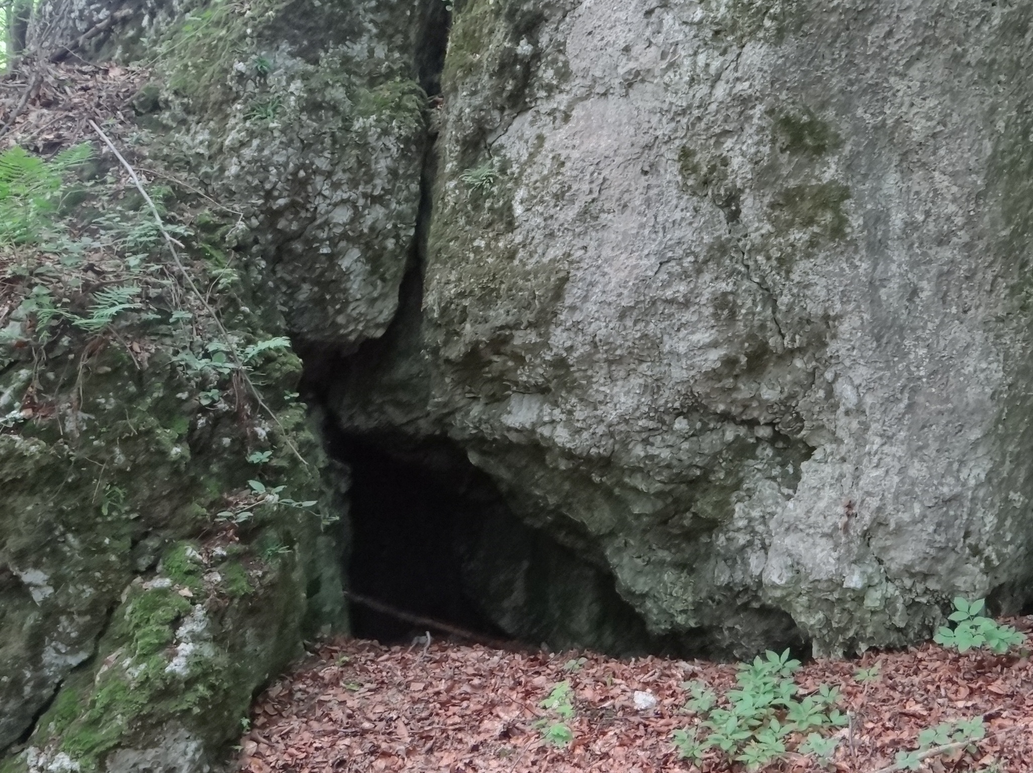 Korytarz w Krętych Skałach w Dolinie Szklarki